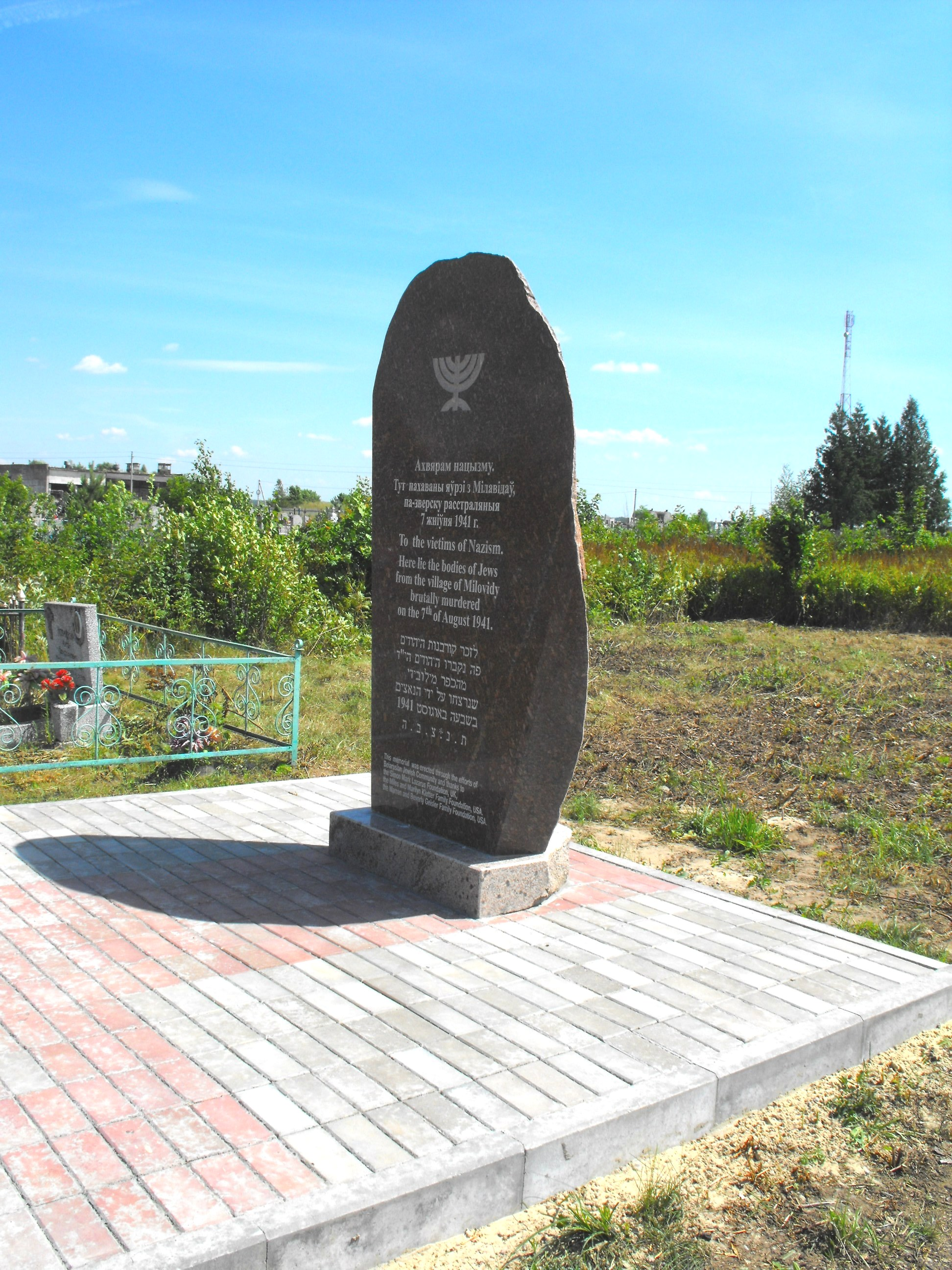 Памятник на месте перезахоронения 25 евреев, убитых в Миловидах во время Холокоста. Находится на местном кладбище в деревне Миловиды Барановичского района. Установлен вместо старого памятника в 2016 году.